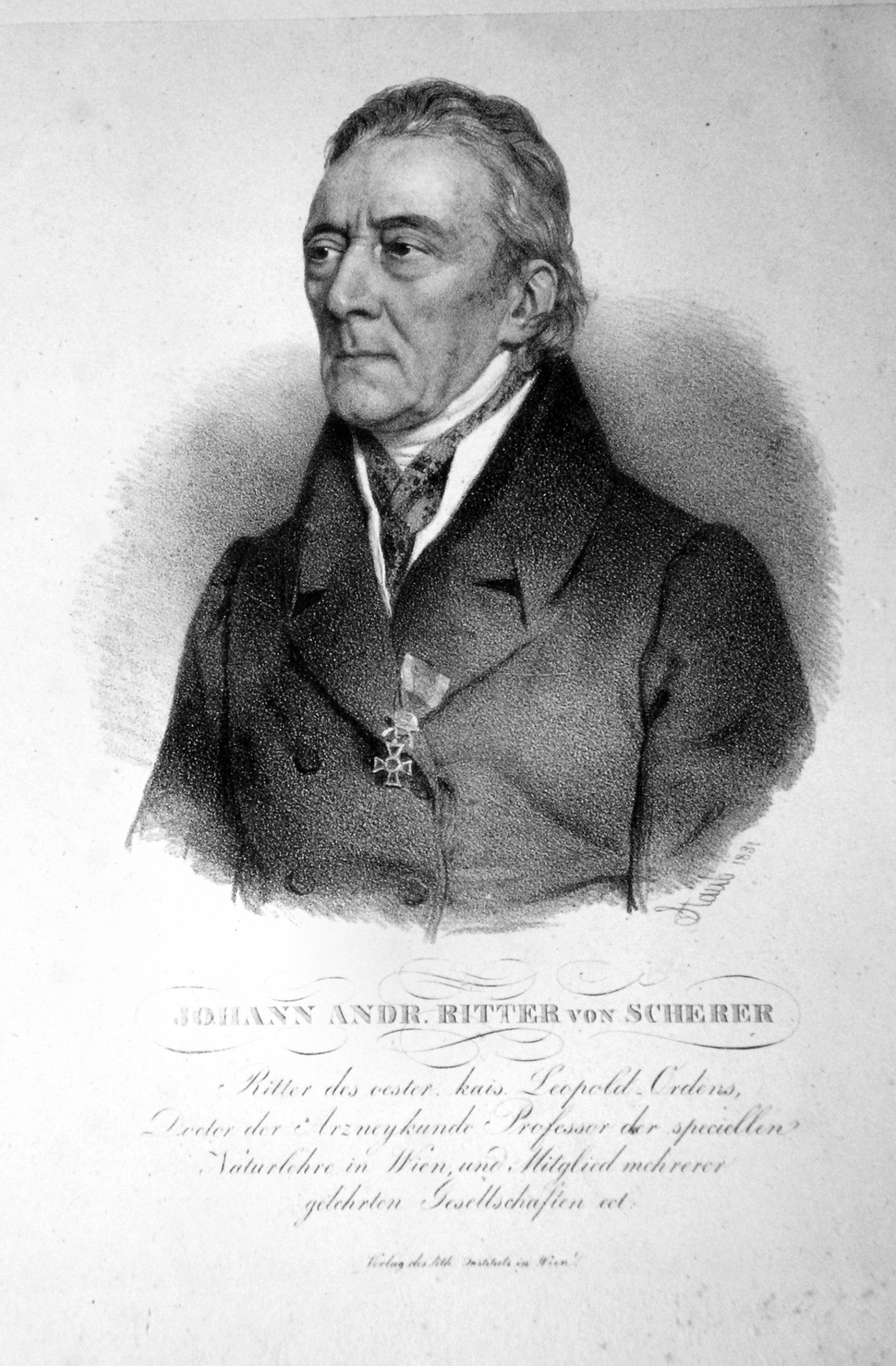 Johann Andreas von Scherer (1755-1844), Arzt, Chemiker, Naturforscher. Lithographie.